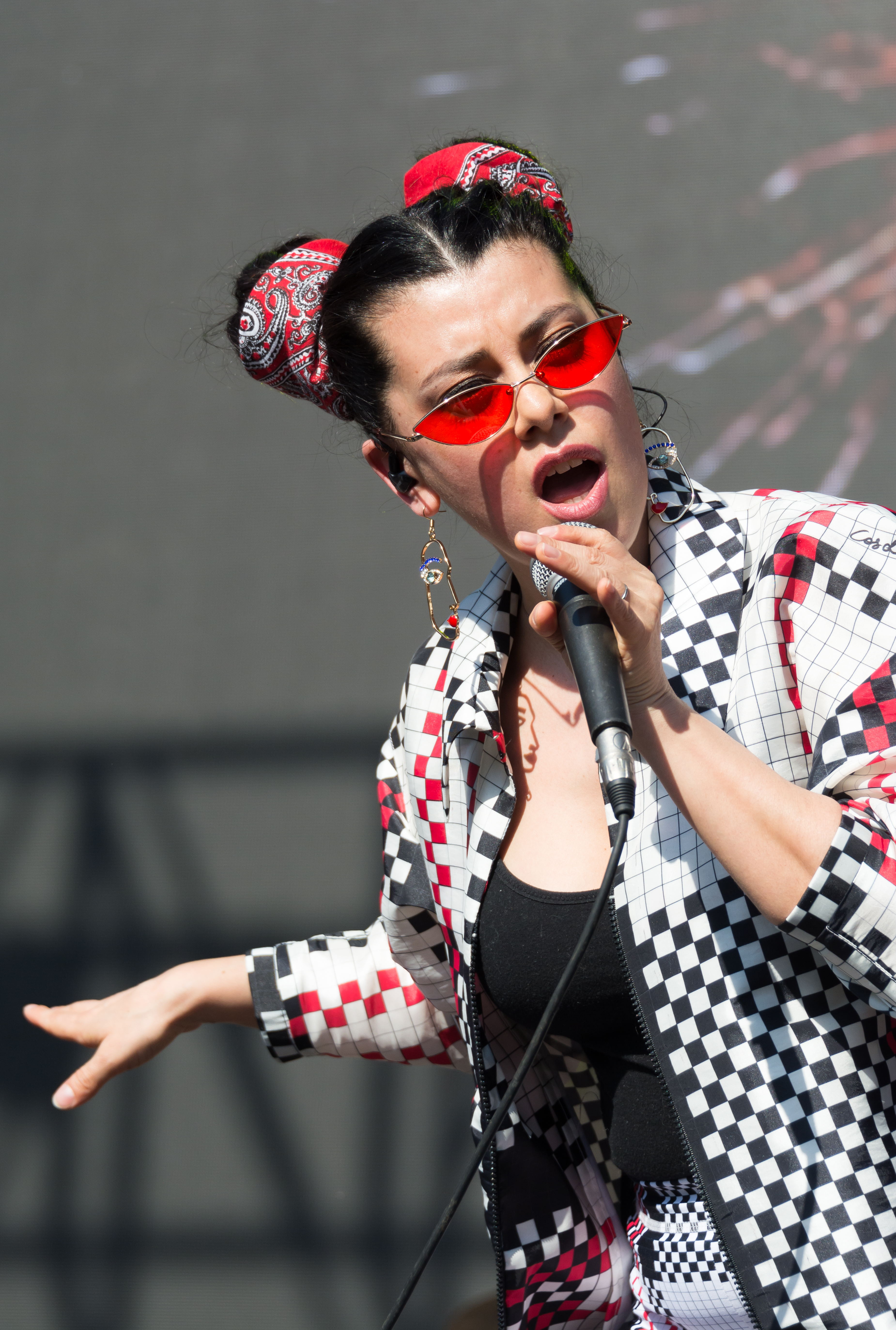 Mariel Mariel, Día de la música chilena 2019, Velódromo del Estadio Nacional, Ñuñoa, Santiago, Chile.